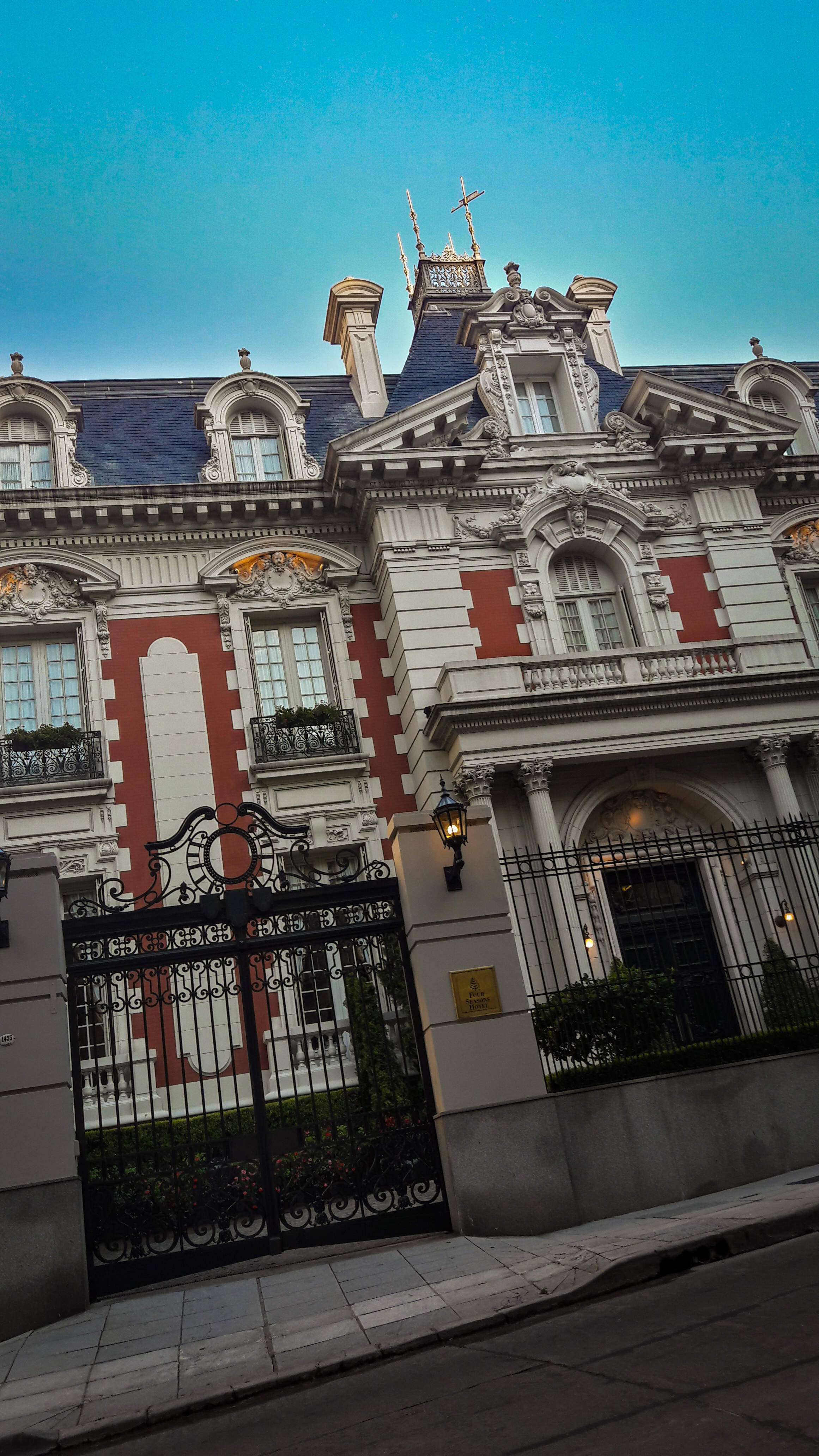 Ex Palacio Álzaga Unzué 2018